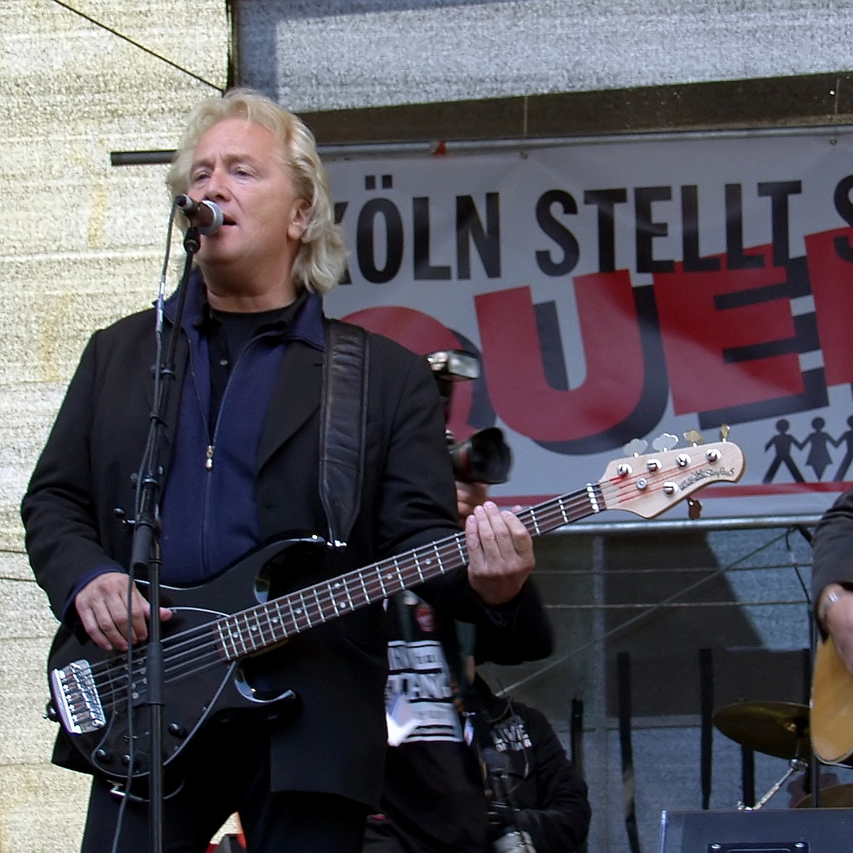 Hannes Schöner der Gruppe „Höhner“ auf der politischen Demonstration „Köln stellt sich quer“ gegen den so genannten „Anti-Islamisierungskongress“ der rechtsgerichteten Partei „Pro Köln“ vor dem Gürzenich in Köln.